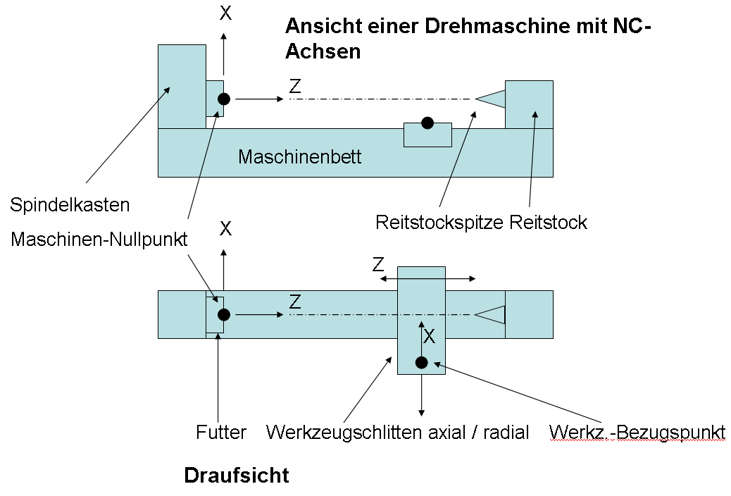 Drehmaschine mit Darstellung von Nullpunkt und Achsen.